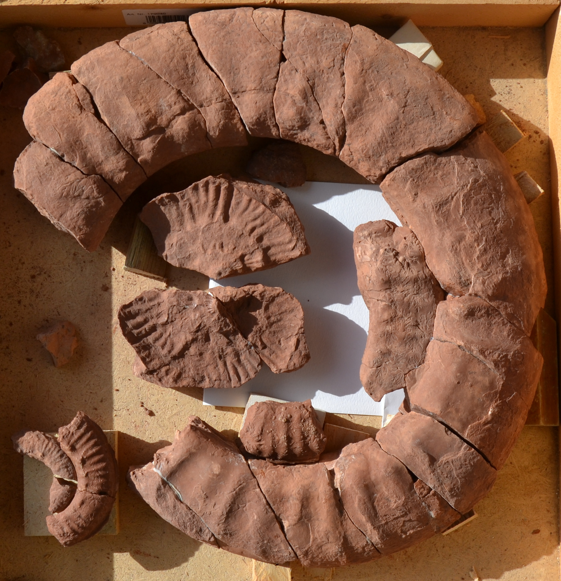 Rarenodia gr. planulata, ammonite di grande taglia proveniente dalla zona del M. Serano (abitato di Val Lupo, presso Foligno). L’esemplare è un modello pietroso frammentario, però la camera di abitazione è conservata fino al diam. di 33 cm. Considerato che manca ancora circa mezzo giro della conchiglia originaria, l’ammonite aveva un diam. stimato di circa 40-42 cm. Si tratta dell’esemplare più grande fino ad ora trovato sul “Rosso Ammonitico” umbro-marchigiano. Nella figura si vedono frammenti ben conservati dei giri interni posti separati all’interno della cassettina. Si tratta sicuramente delle forme del Rosso Ammonitico (Toarciano) più grandi reperibili in questi strati rocciosi.